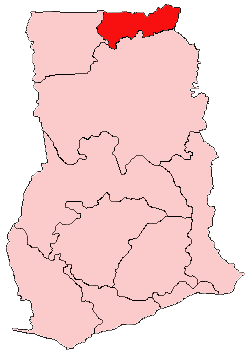 Горноизточният регион на картата на Гана.